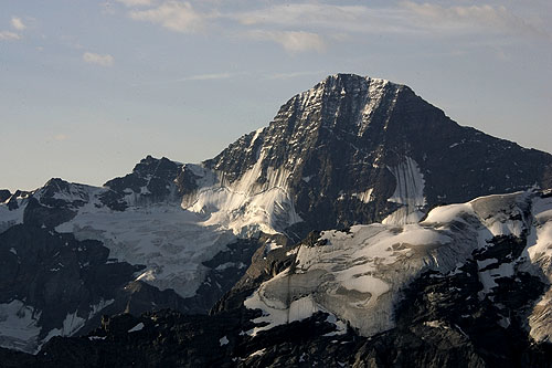 Ausblick vom Schilthorn: Lauterbrunnen Breithorn